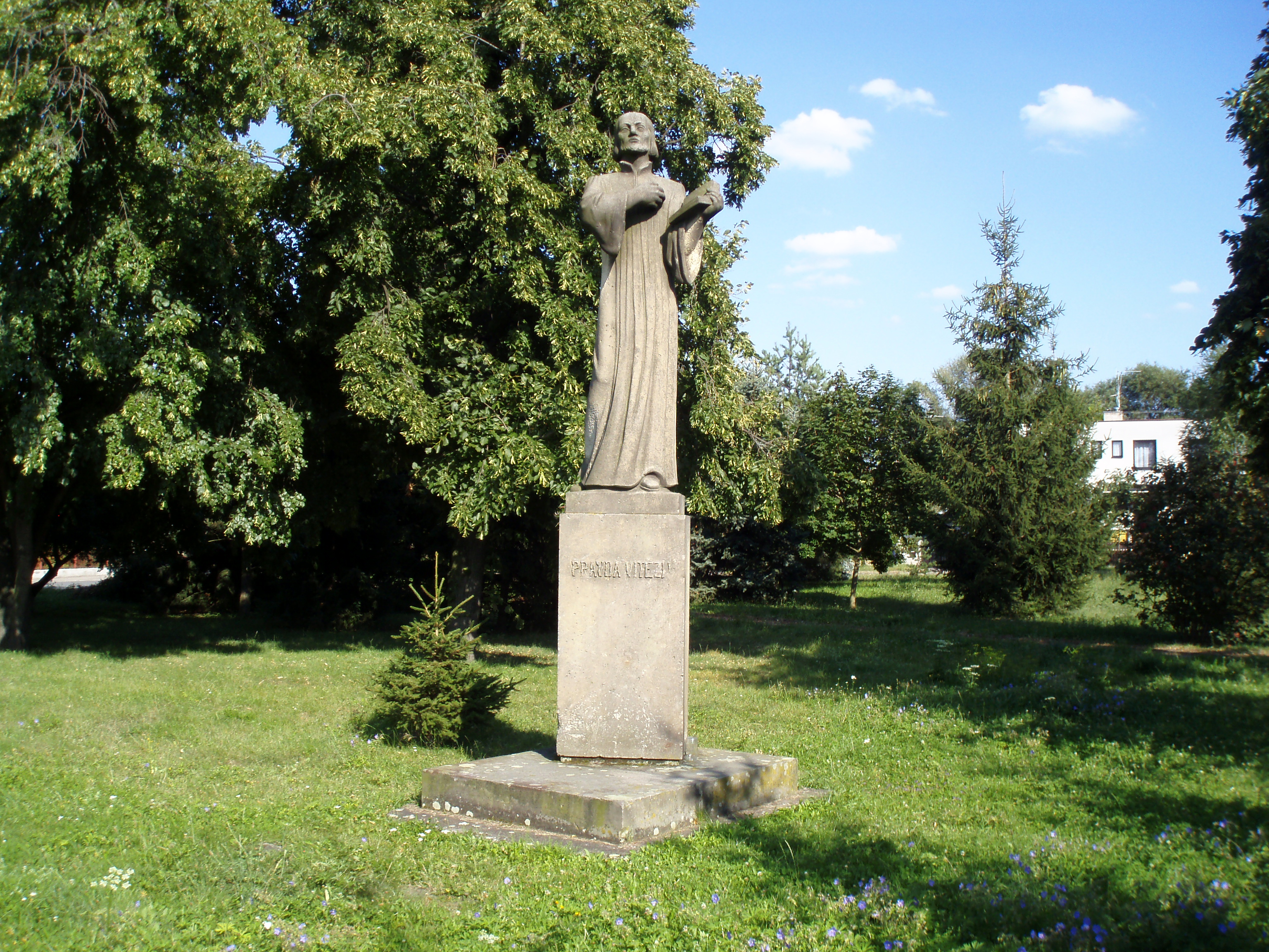 Pomník J. Husa v Plotištích (Hradec Králové)